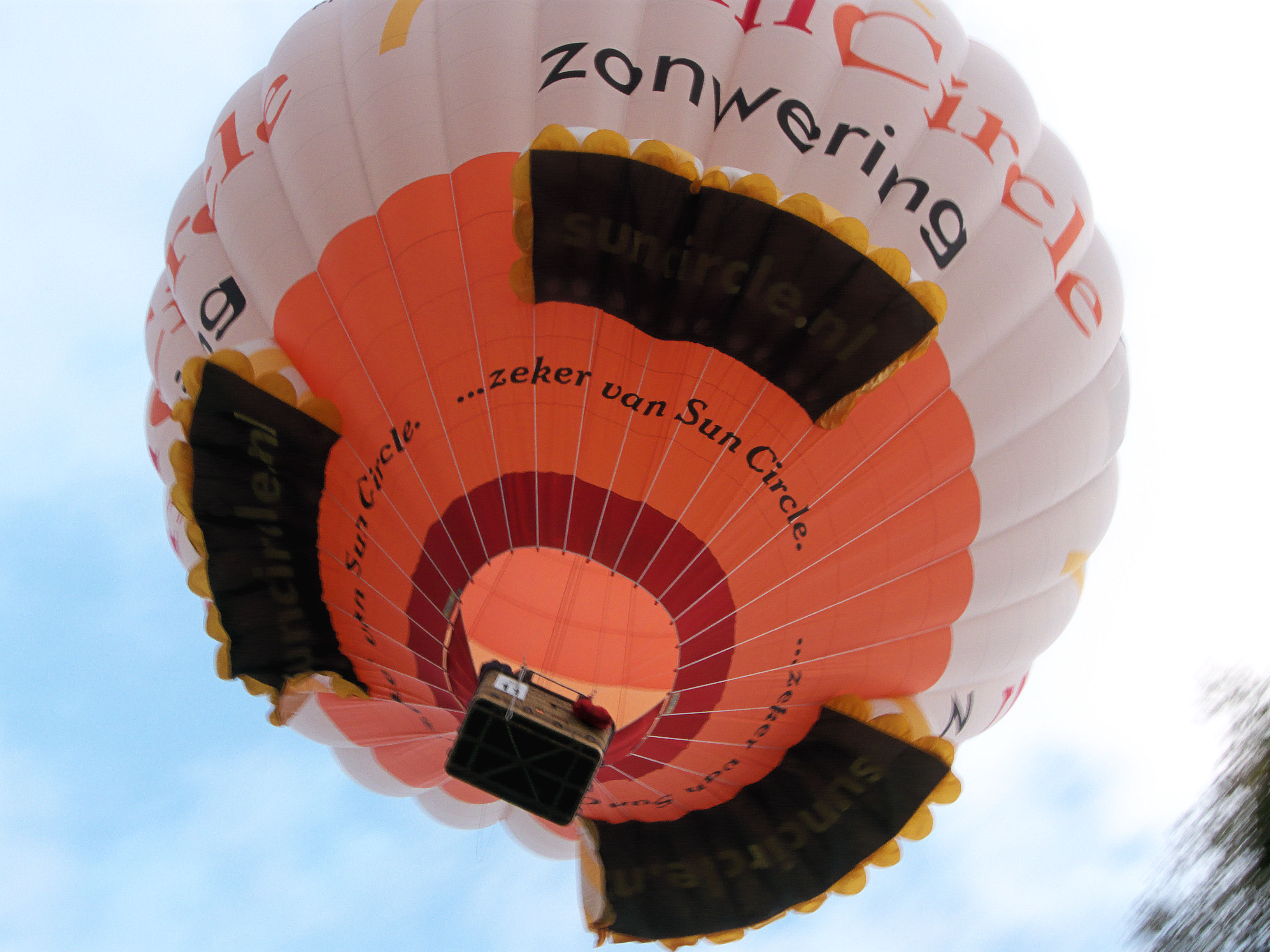 Hete luchtballon